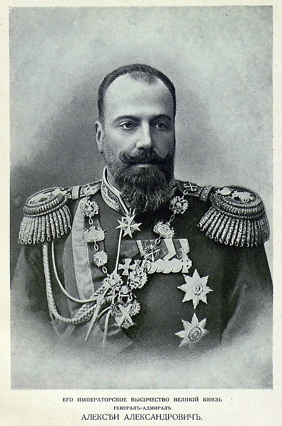 Великий князь Алексей Александрович, августейший генерал-адмирал